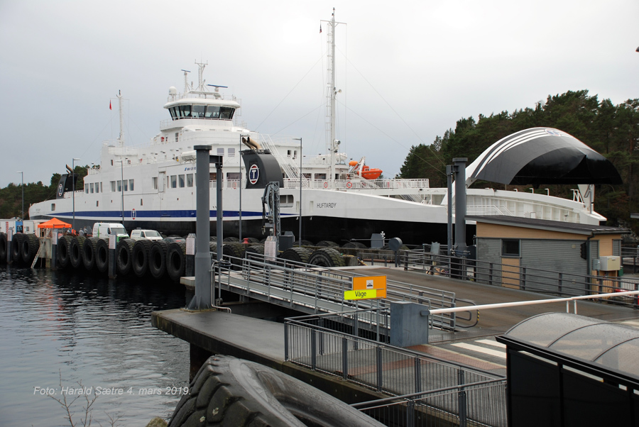 MF «Huftarøy» ved Halhjem fergekai den 4. mars 2019.